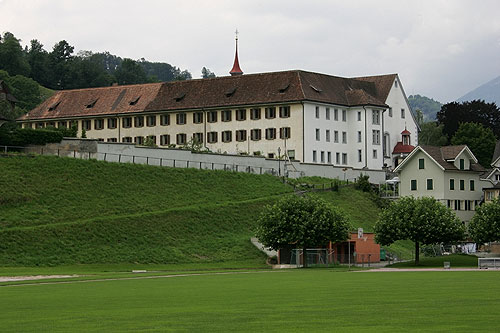 Stans: Kapuzinerkloster